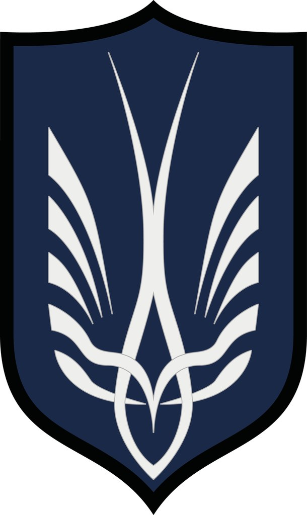 Відзнака куреня